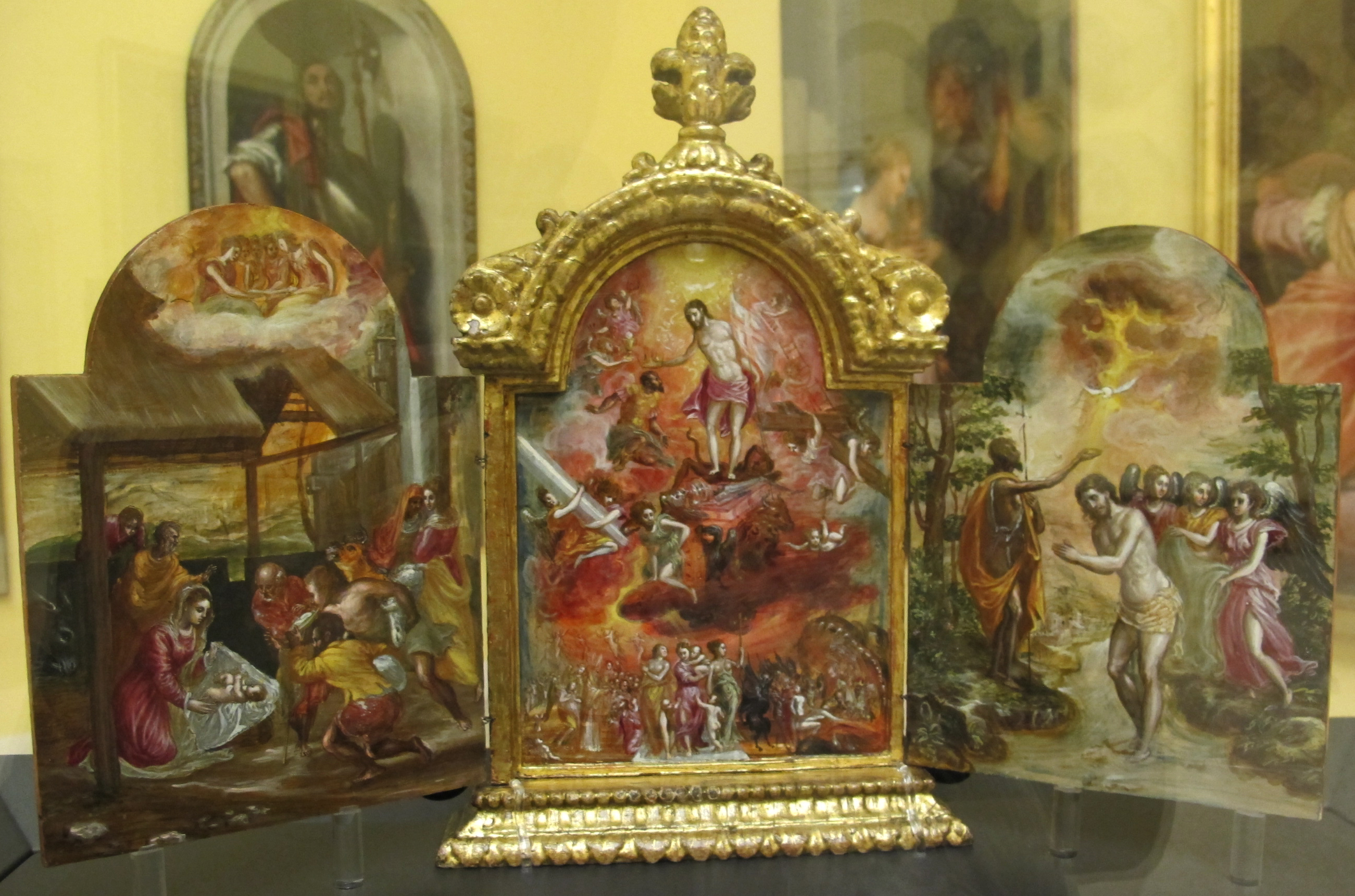 Trittico di el greco